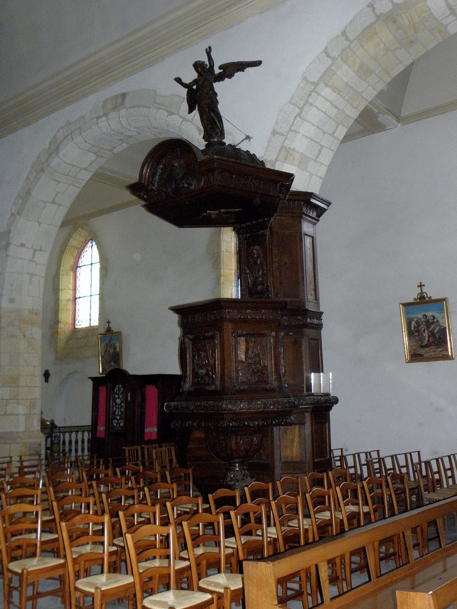 Chaire de l'église Saint-Martin-de-Tours d'Amanlis (35).